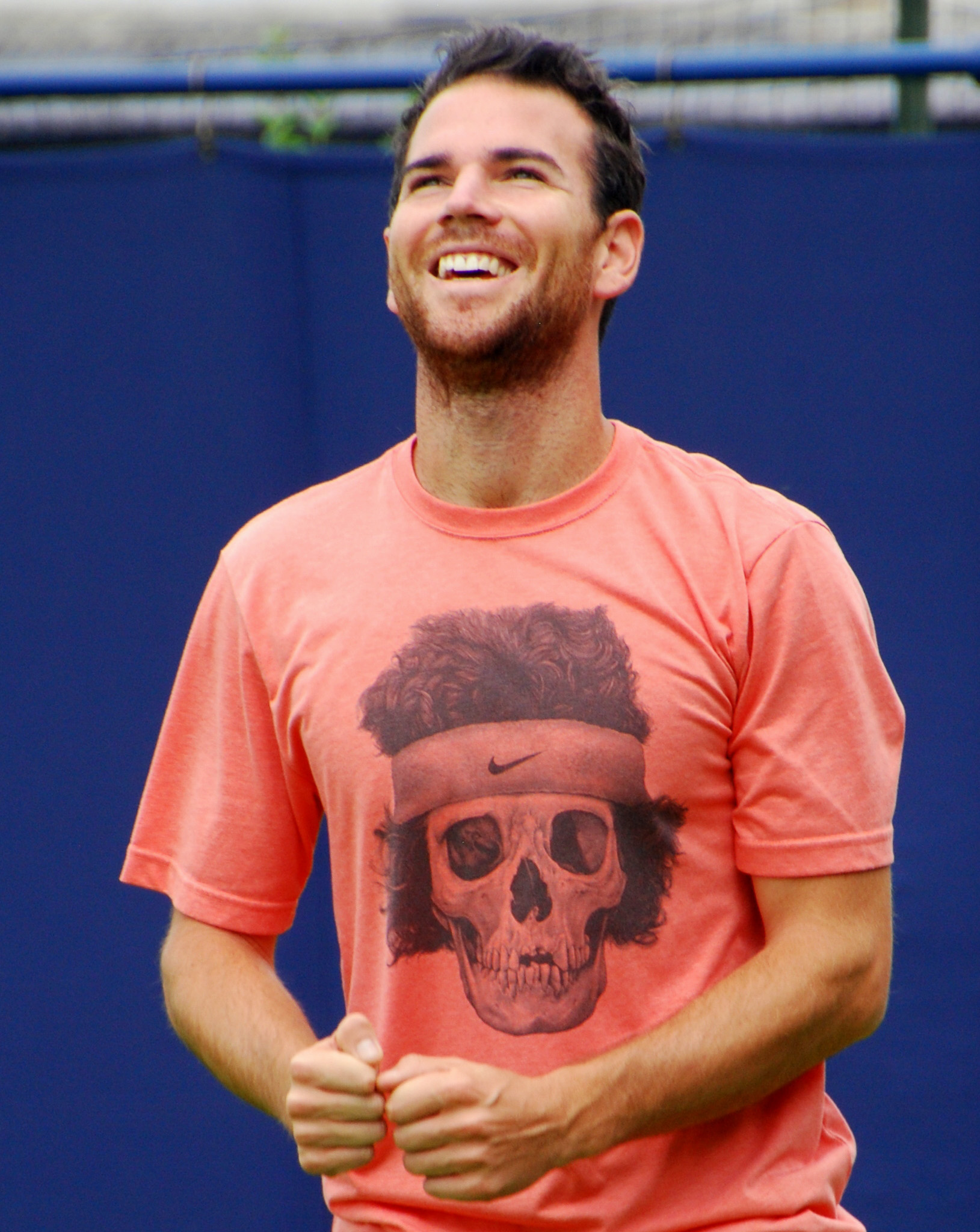 Adrian "Volleyball" Mannarino